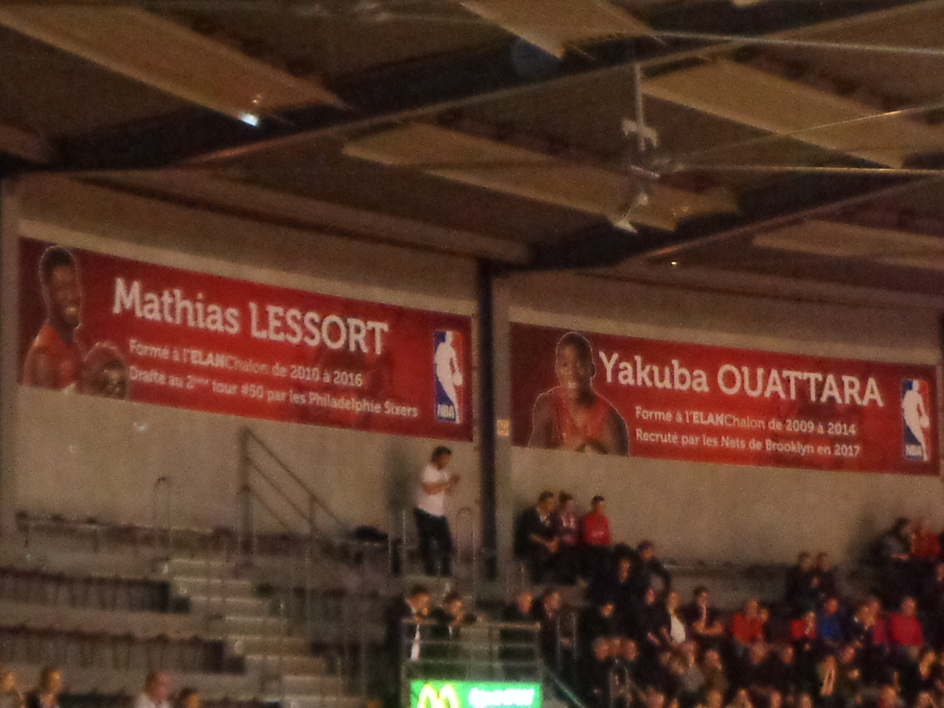 Pancarte des joueurs qui ont été formé à l'Elan Chalon et qui évolue ou ont un rapport avec la NBA.